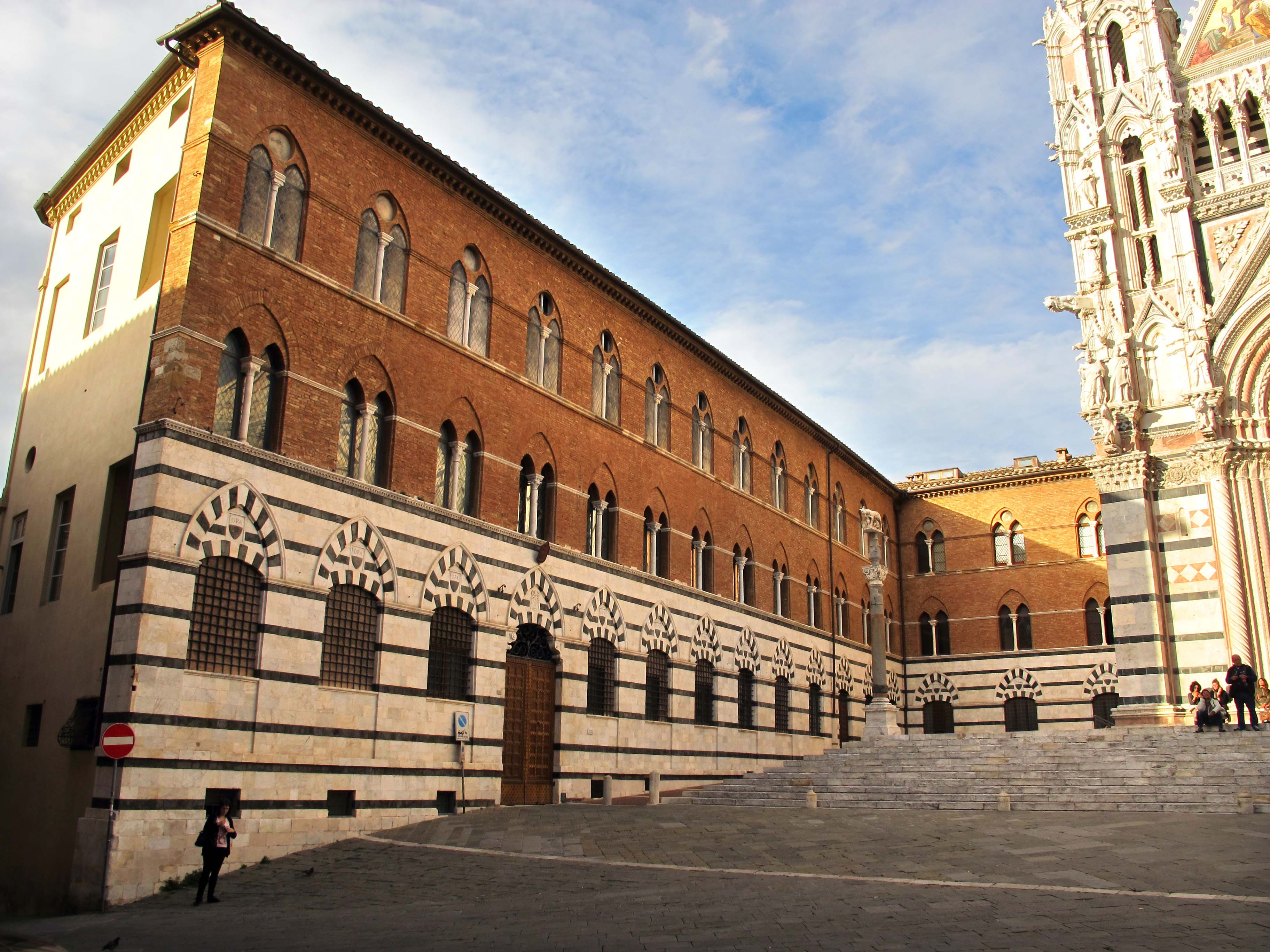 Siena, piazza del Duomo e dintorni